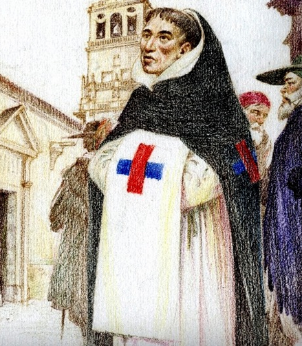 São João Batista da Conceição, Reformador, Ministro, Escritos e Mistico da Ordem da Santíssima Trindade.